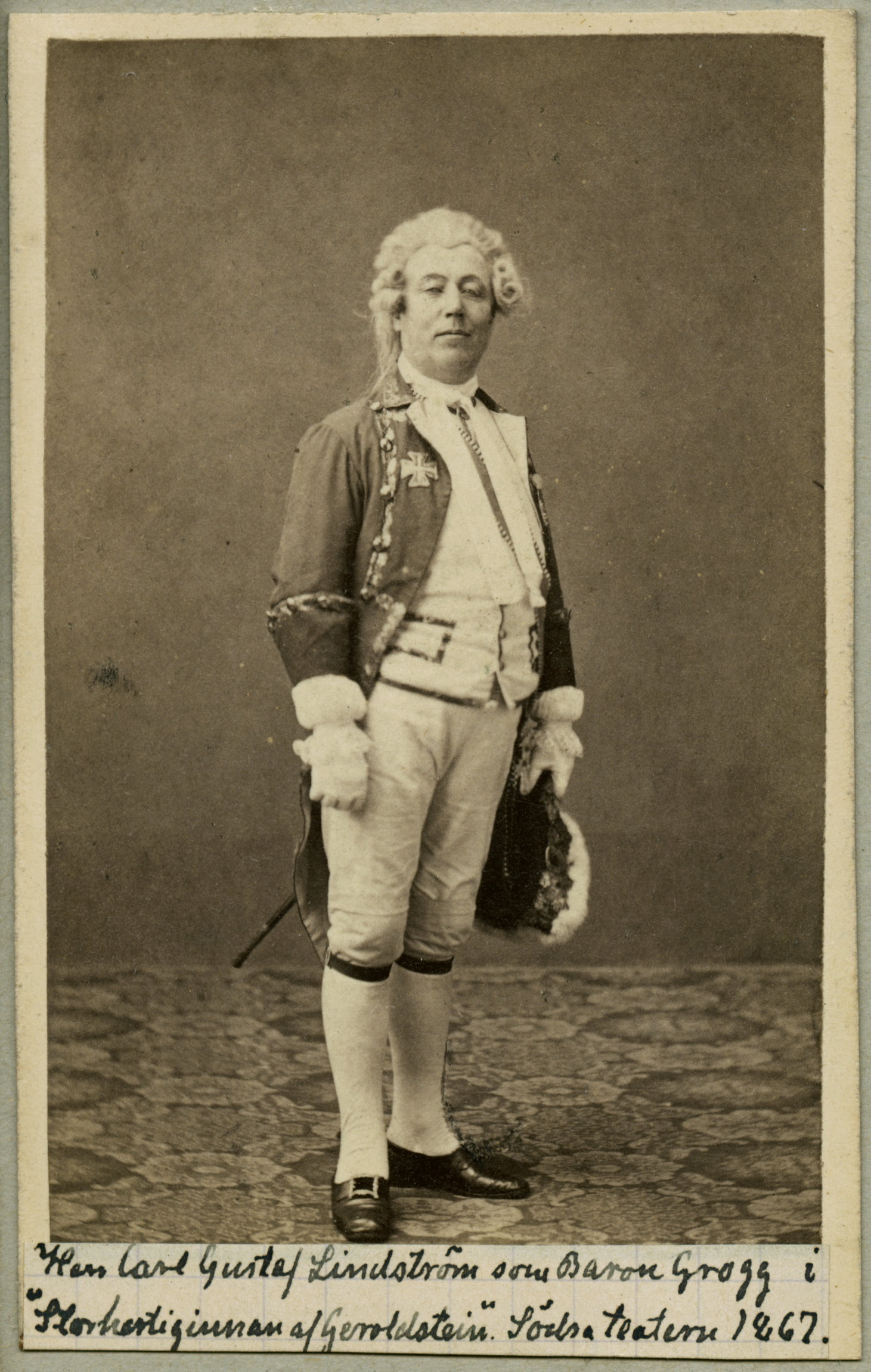 Carl Gustaf Lindström (1818–1893) som Baron Grogg i Storhertiginnan af Gerolstein, Södra teatern, Stockholm